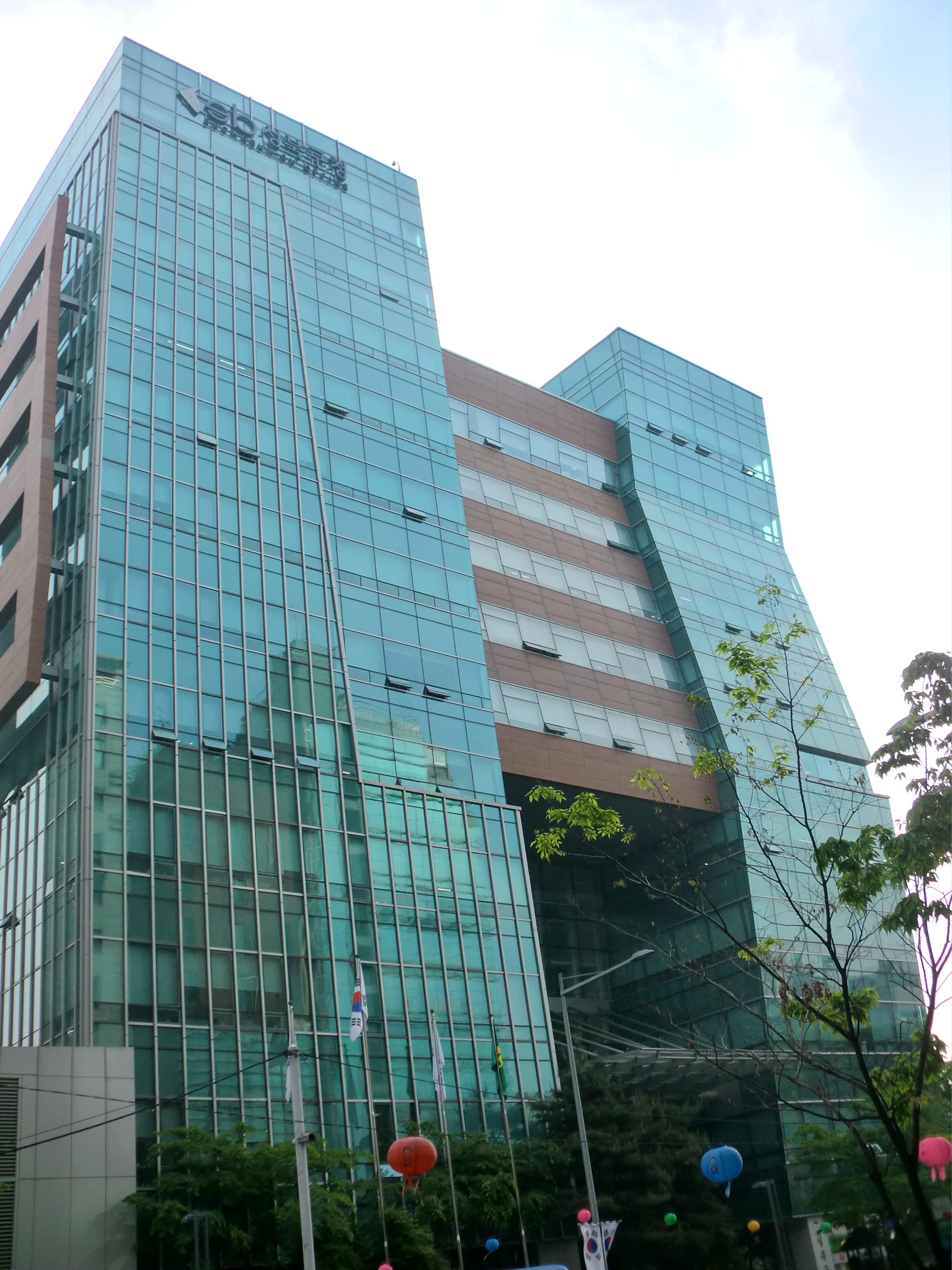 서울특별시 성북구에 있는 성북구청